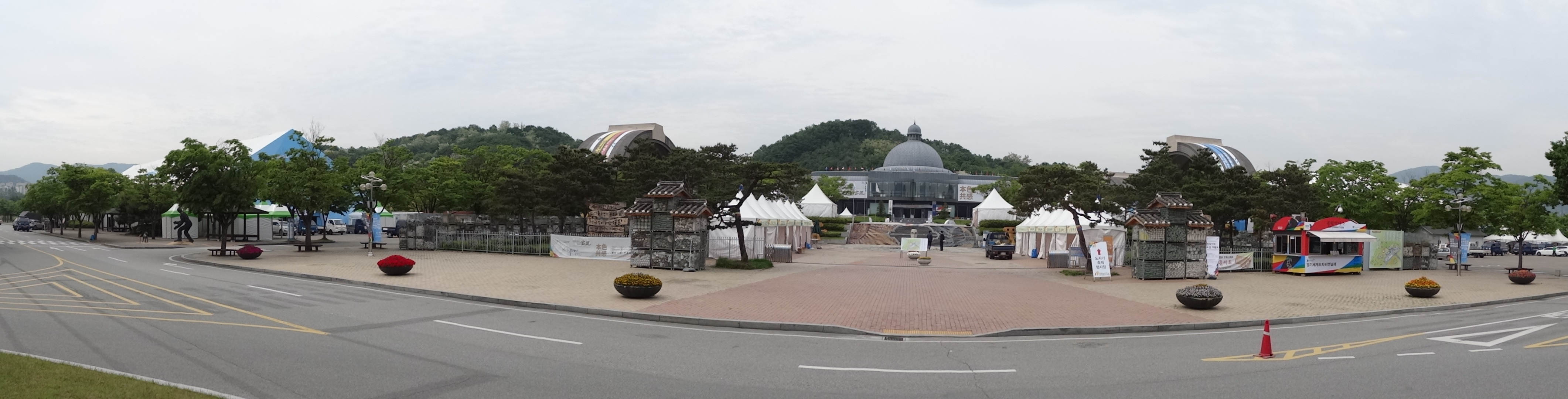 곤지암도자공원도자기엑스포조각공원 (5)